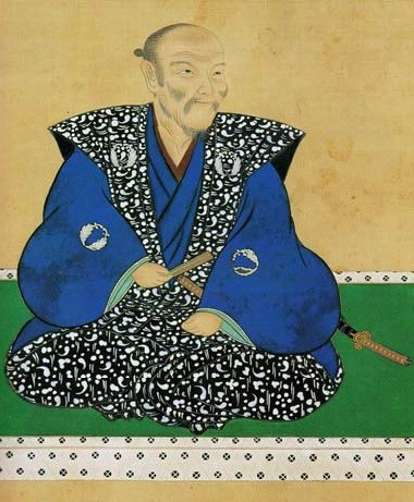 稲垣長茂の肖像。